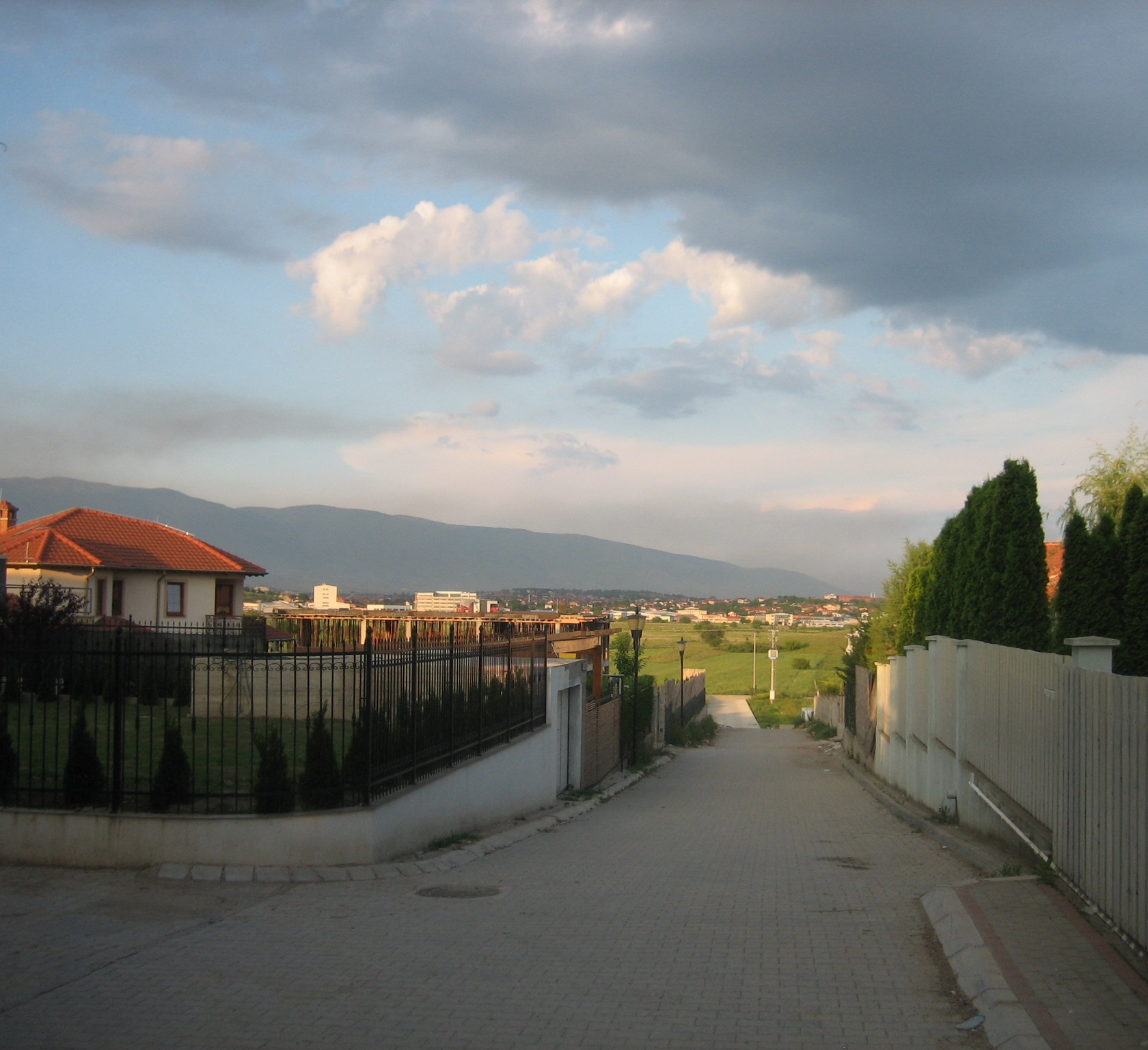 Bardovci